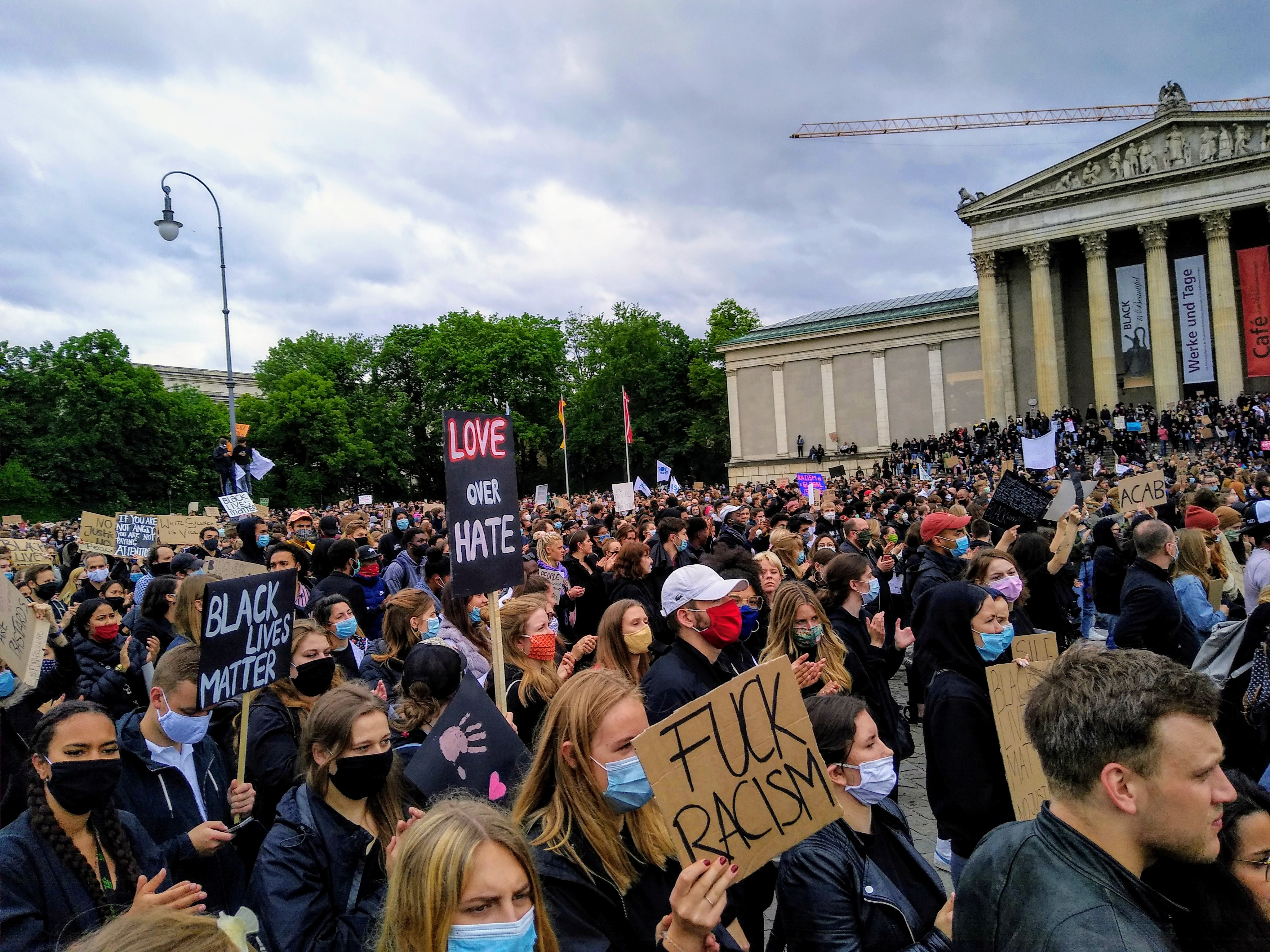 Black Lives Matter Demonstration in München am 2020-06-06 auf dem Königsplatz